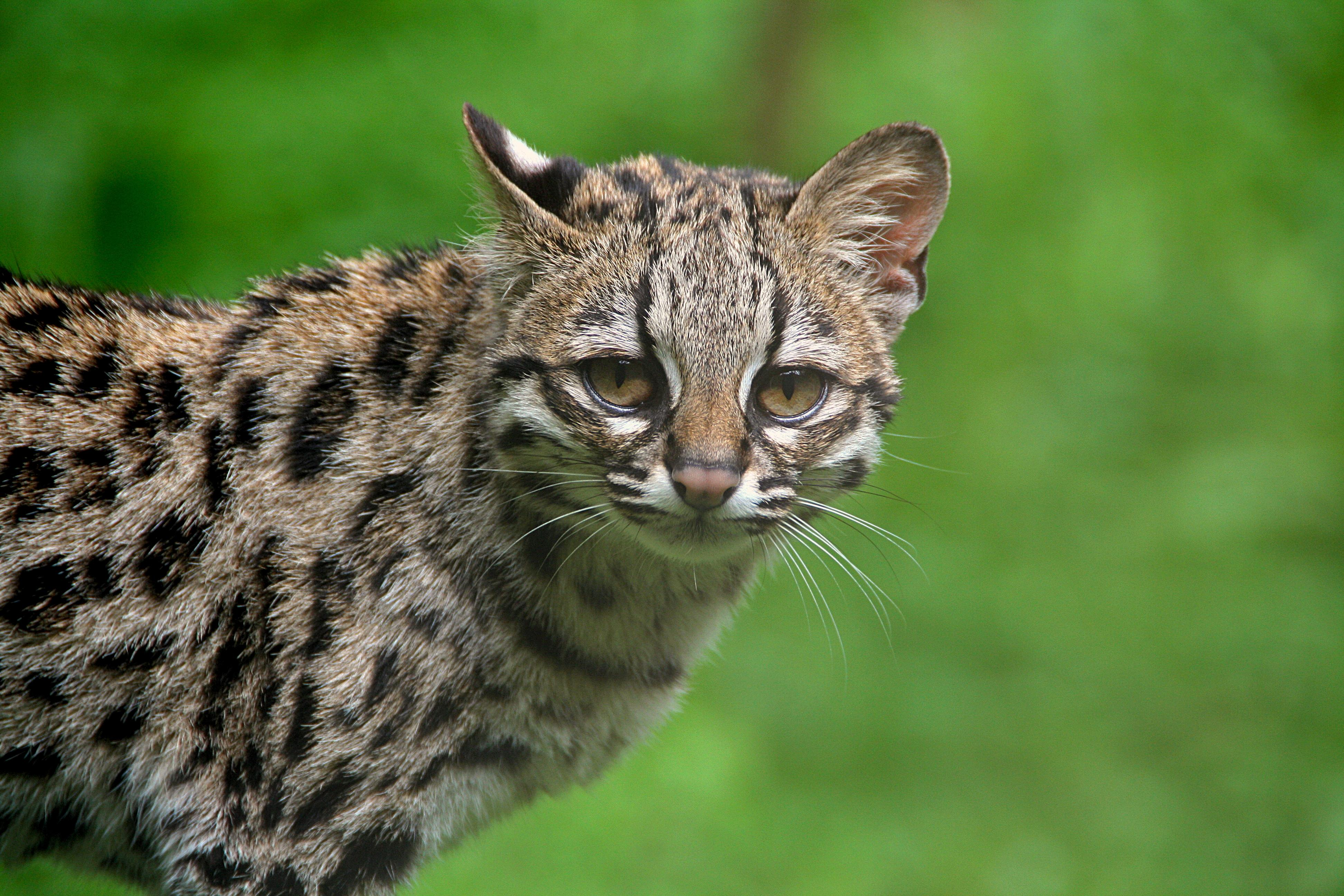 Un Margay photographié au Parc des Félins de Lumigny-Nesles-Ormeaux, France